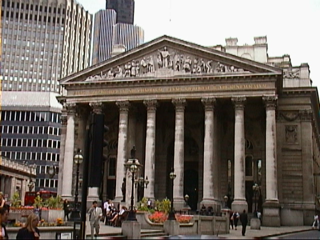 Royal Exchange